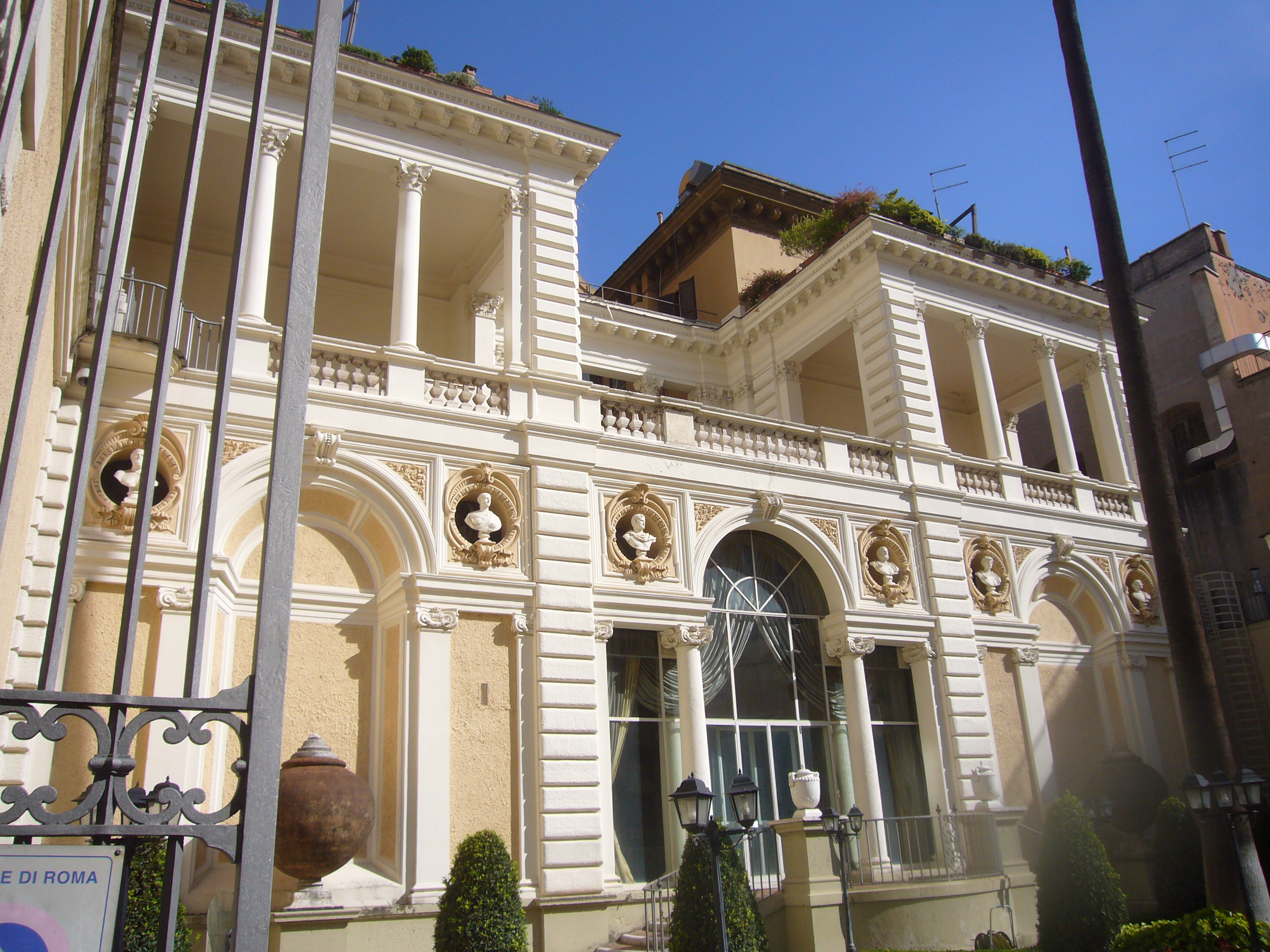 Roma, via Marche, villino Folchi (1895, G.B. Giovenale)